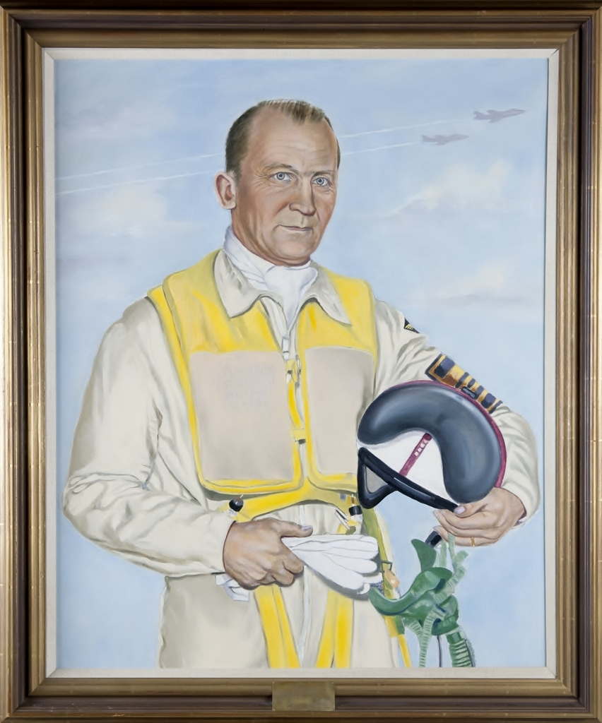 Porträttmålning på Överste Gösta Odquist, chef för kungl. Västmanlands flygflottilj (F 1) 1/7 1954- 30/9 1959. Målningen skapad av H. Kraft år 1959. IDENTIFIKATIONSNUMMER FVM.120215